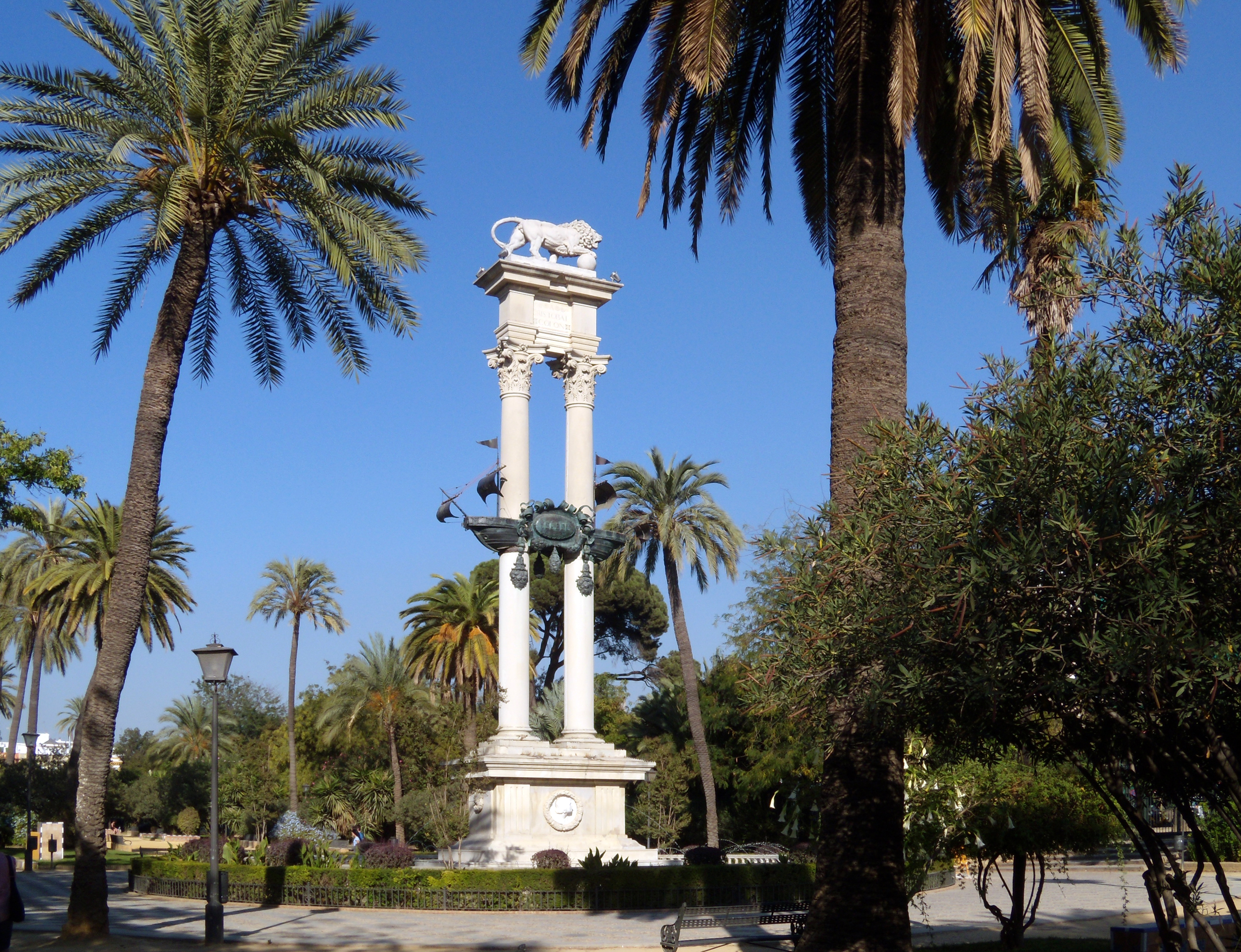 Monument à Christophe Colomb dans la promenade de Catalina de Ribera, à Séville (Espagne)